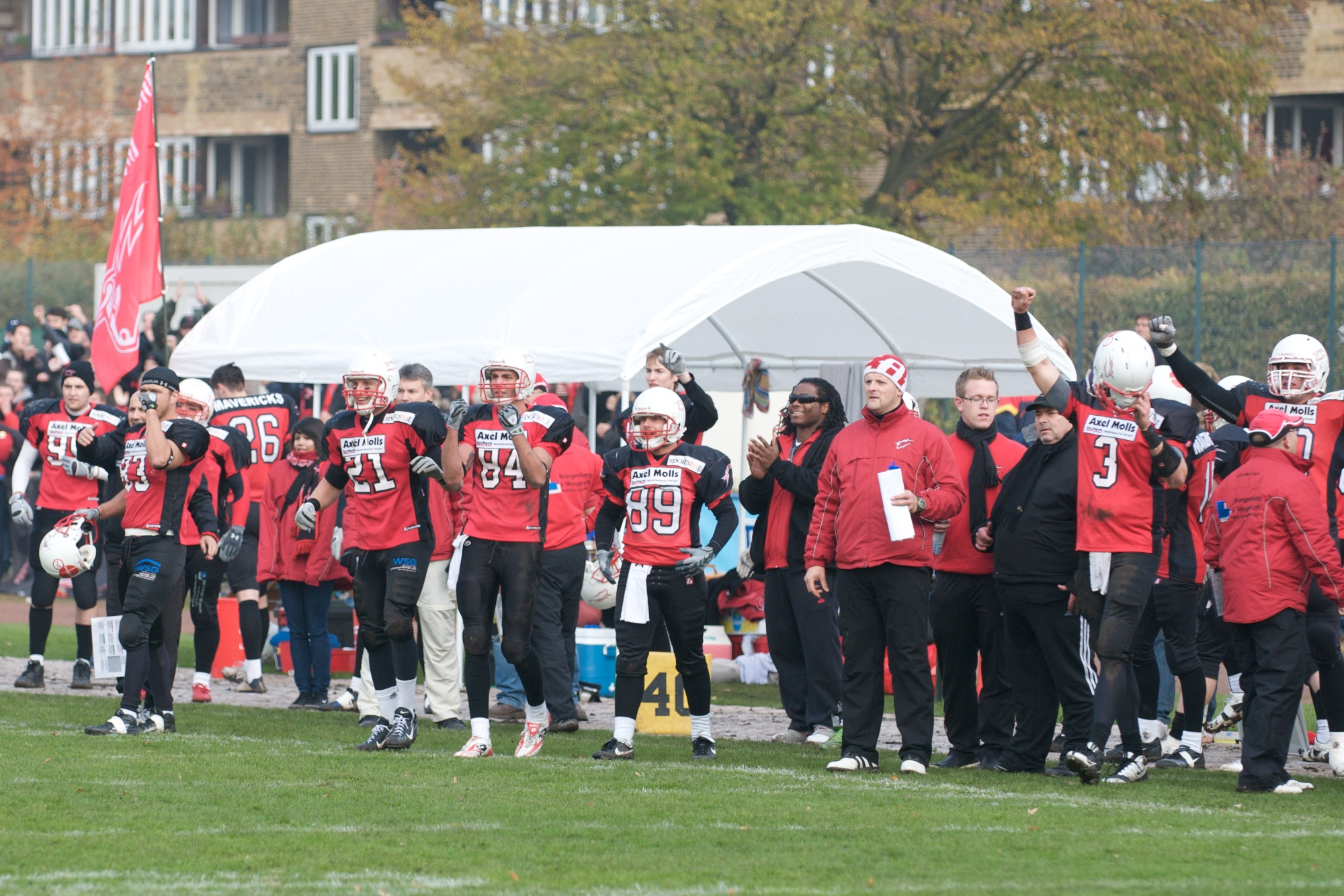 Mönchengladbach Mavericks-Sideline beim Relegationsspiel in Hamburg